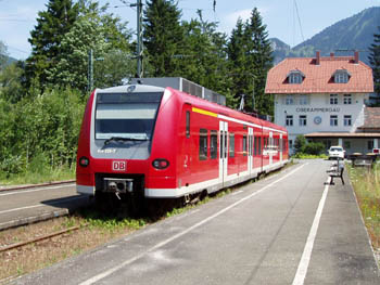 Ein Triebwagen der Baureihe 426 im Bahnhof Oberammergau